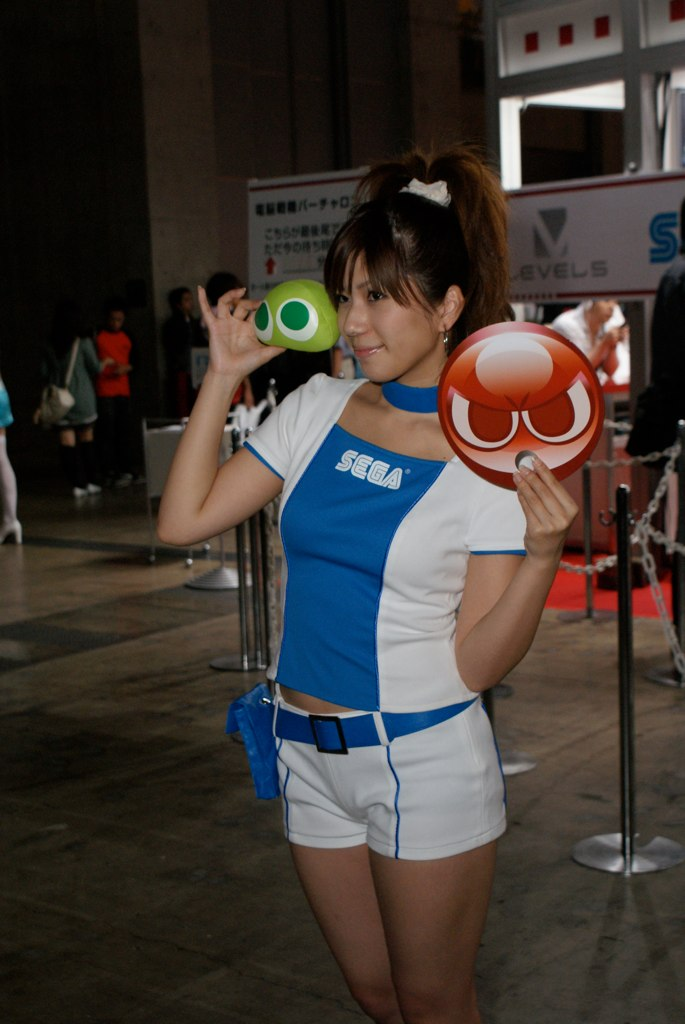 2009東京電玩展，世嘉攤位的宣傳模特兒宣傳《魔法氣泡》。